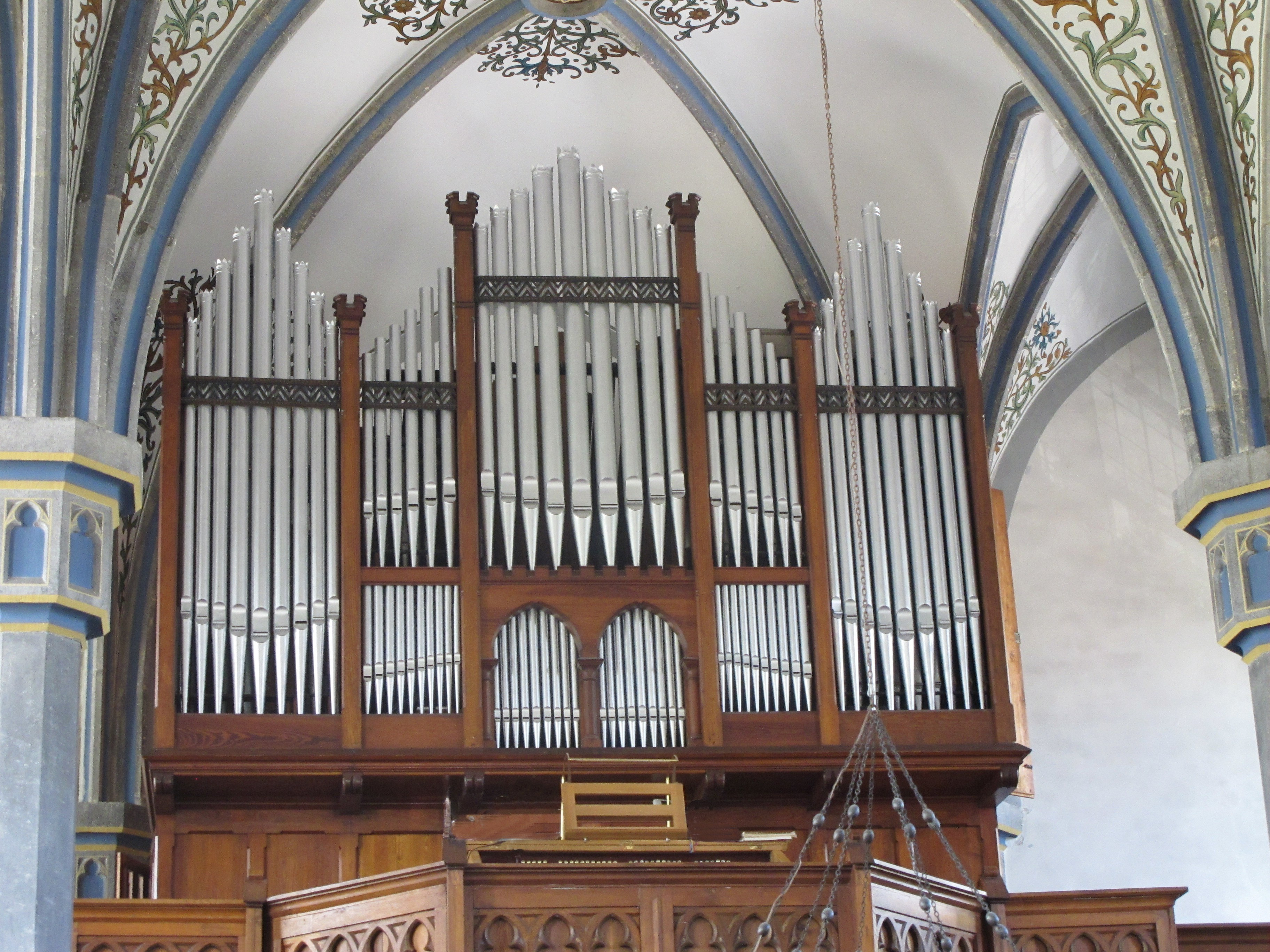 Walcker Orgel Op. 1371 von 1907 in der ev. Friedenskirche Eupen (Belgium)